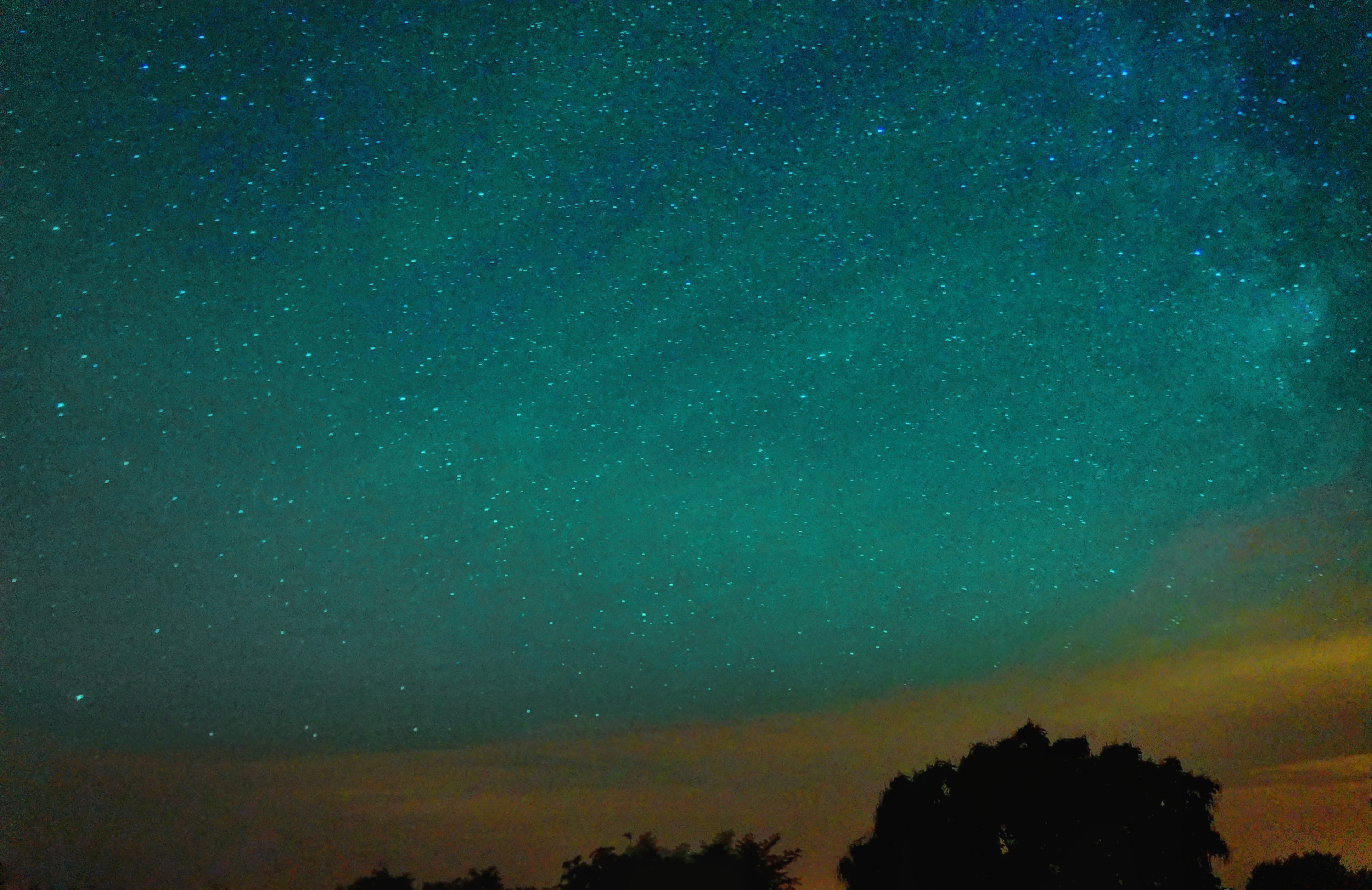 Plus faible que la lumière zodiacale, cet airglow (ou lumière nocturne) a été photographié dans le ciel de l'Allier en France. Ces ondulations vertes font penser aux aurores boréales, ce qui n'est pas le fruit du hasard. Ce phénomène se forme à la même altitude, c'est à dire entre 80 et 100 km de haut, dans la thermosphère. Il est visible par les nuits très sombres et sans pollutions lumineuses.